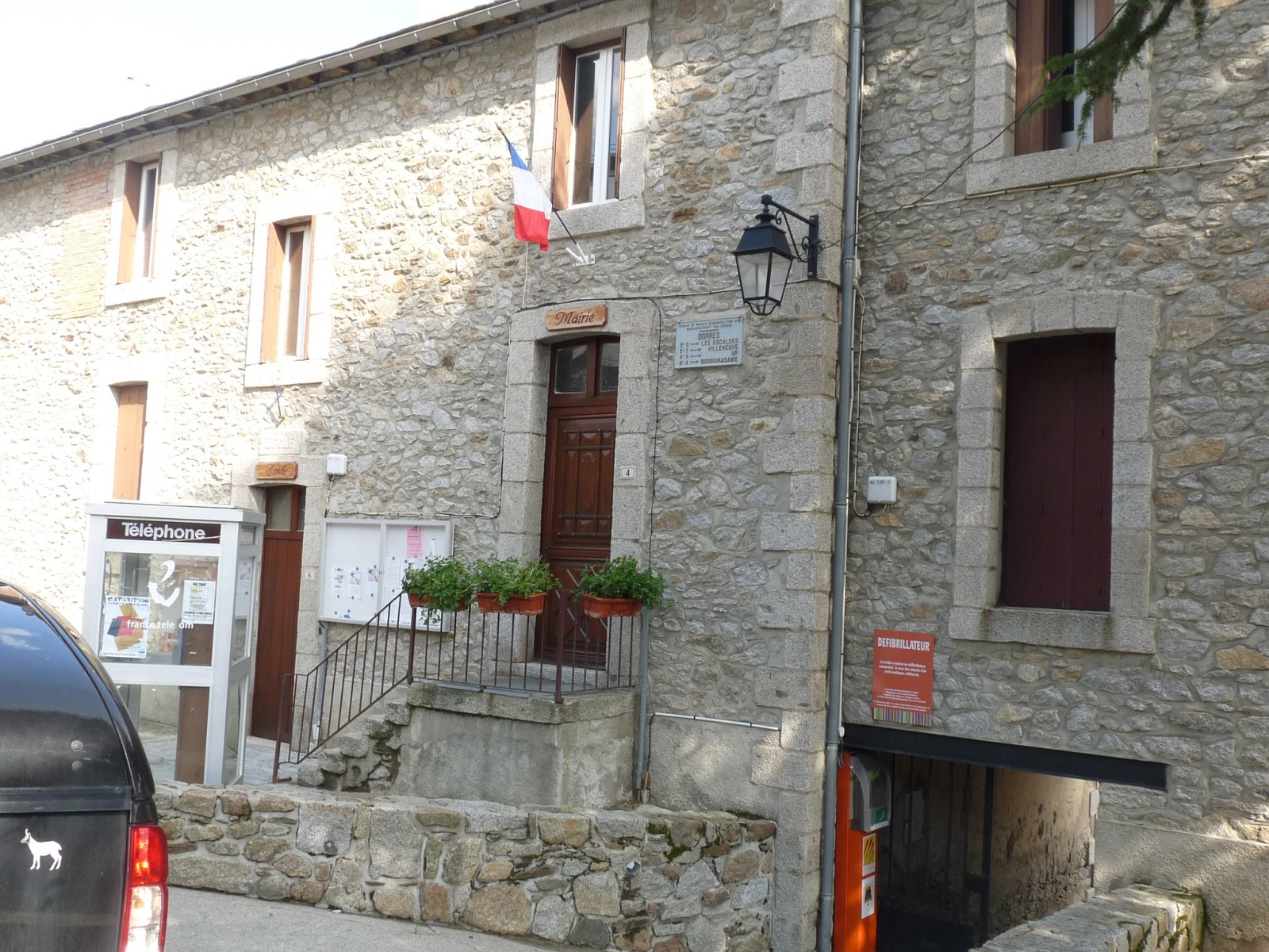 Mairie de Dorres, Pyrénées-Orientales, France